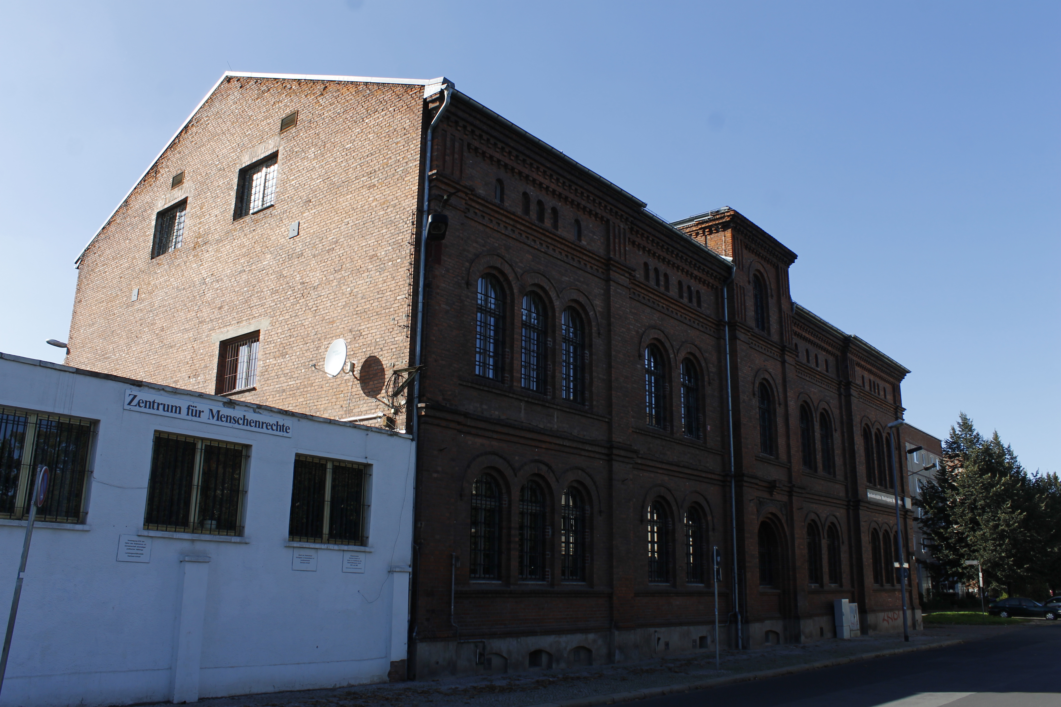 Erbaut 1876 als Königlich-Preußisches Amtsgericht, ab 1940 Nutzung als Gefängnis, seit den 1990er Jahren Gedenkstätte. Sitz des Zentrums für Menschenrechte in Magdeburg. zweigeschossiger Ziegelbau der Gründerzeit, breitgelagerte Platzfront mit zwei Seitenrisaliten und schmalem, turmartigem Mittelrisalit